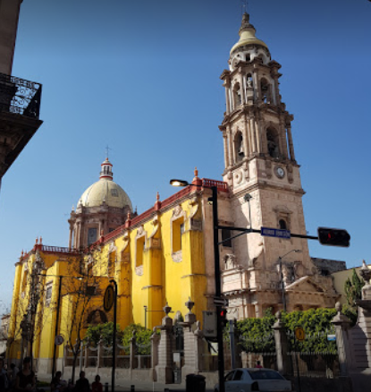 Vista del exterior del Templo de Nuestra Señora del Carmen "Templo del Carmen", ubicado en la ciudad mexicana de Celaya.